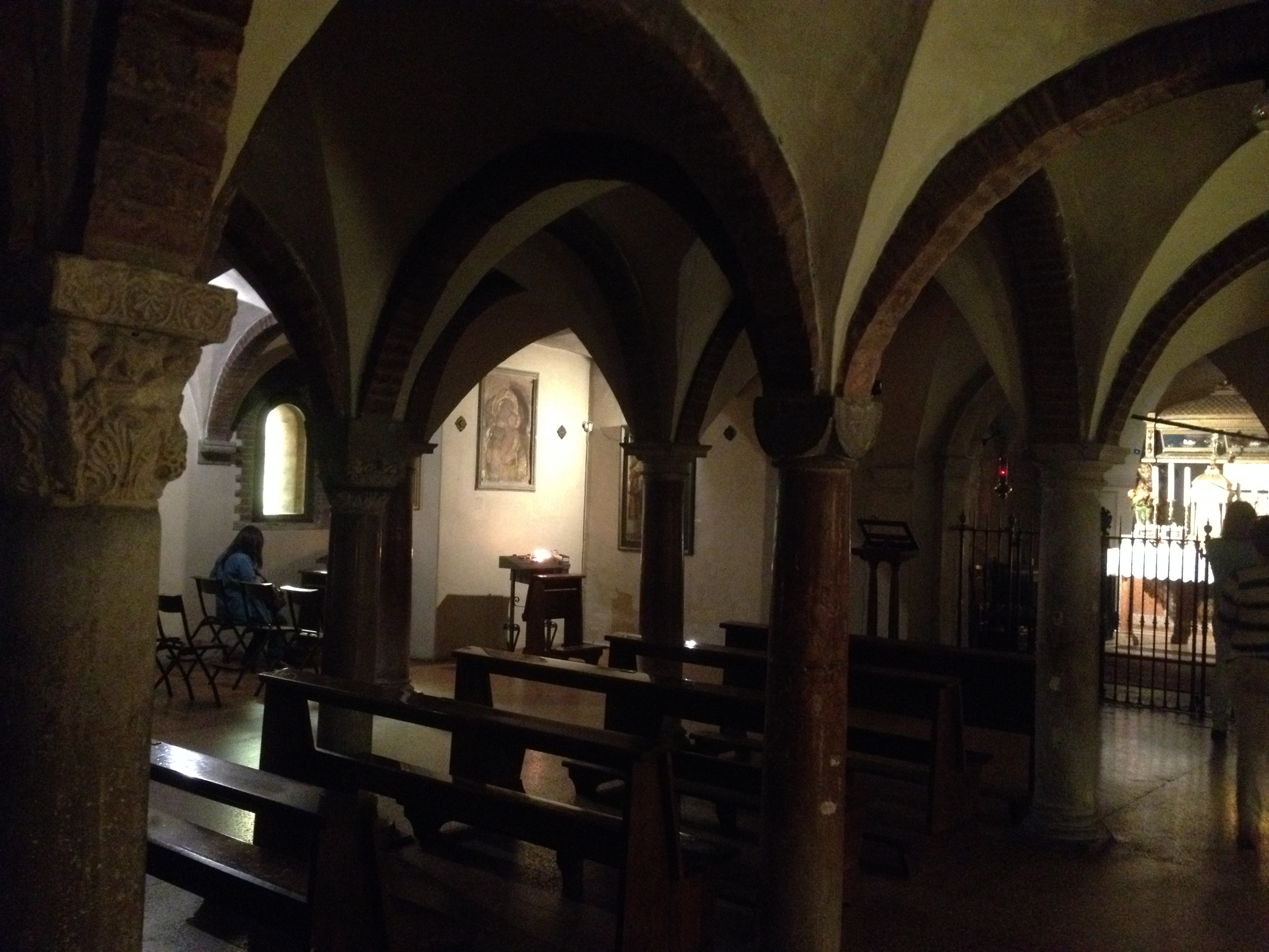 Crypte sous le chœur de l'église du Crucifix